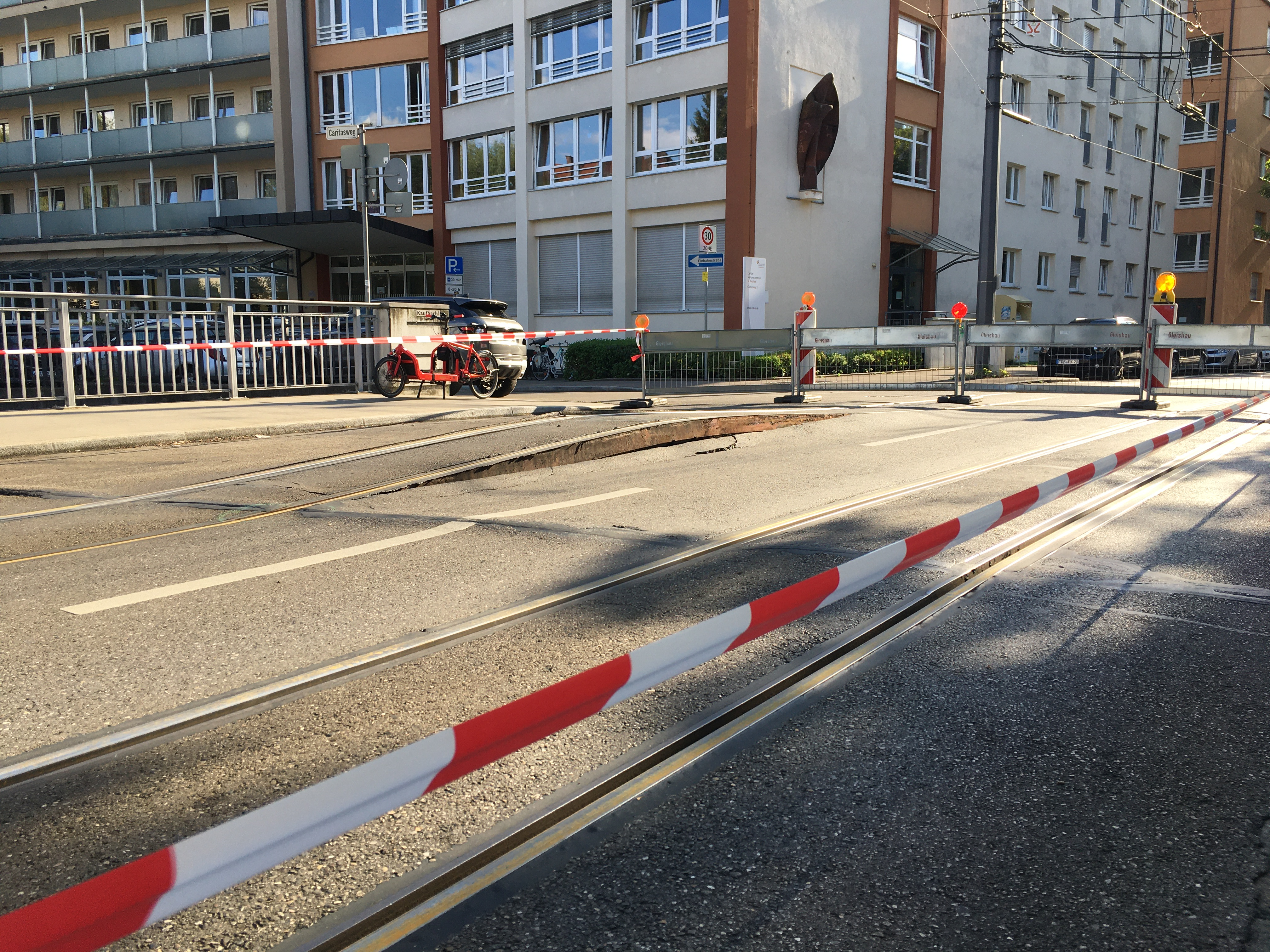 Gleisverwerfung eines Straßenbahngleis in Augsburg im Juli 2020